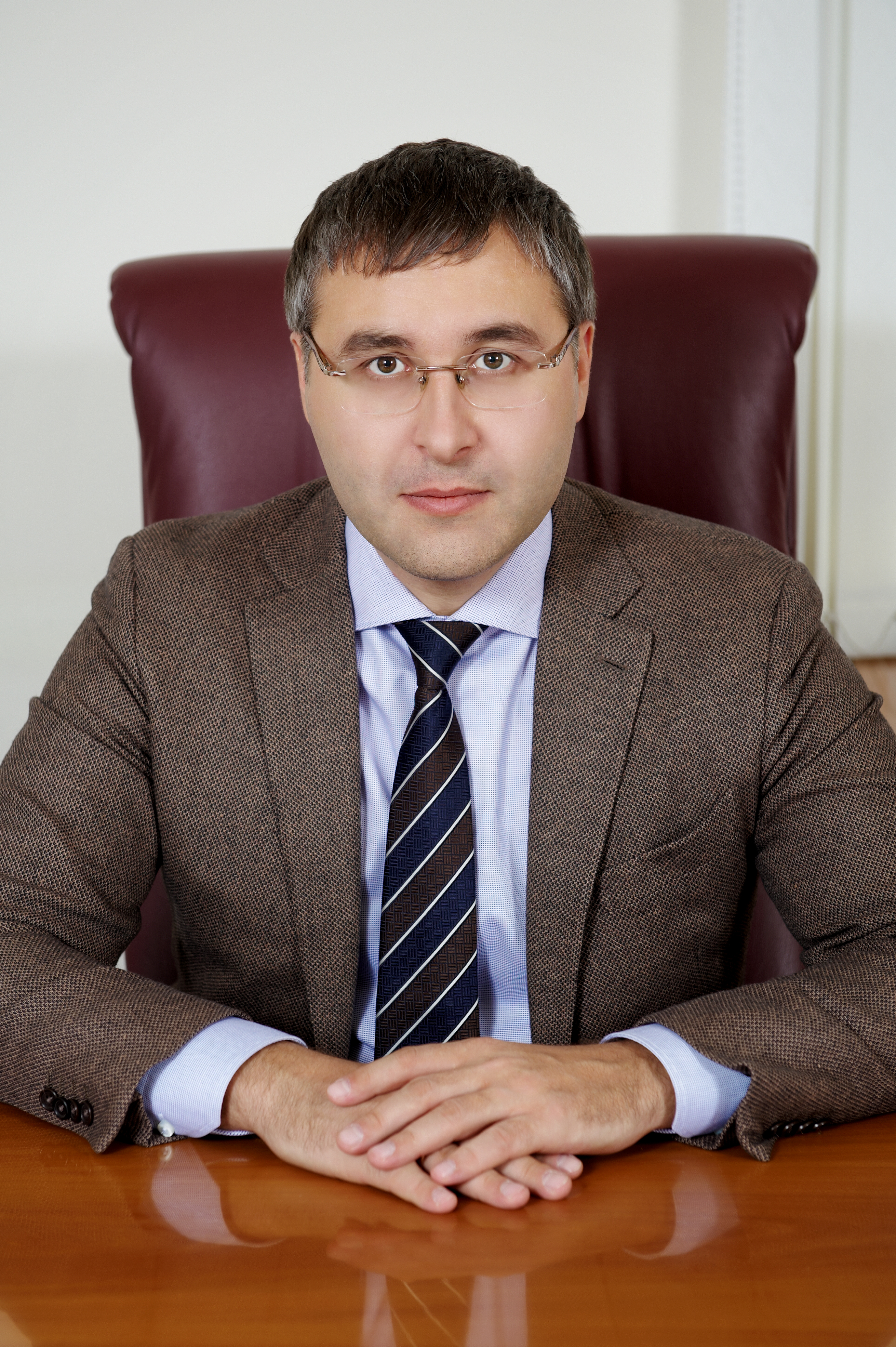 Фальков В.Н.